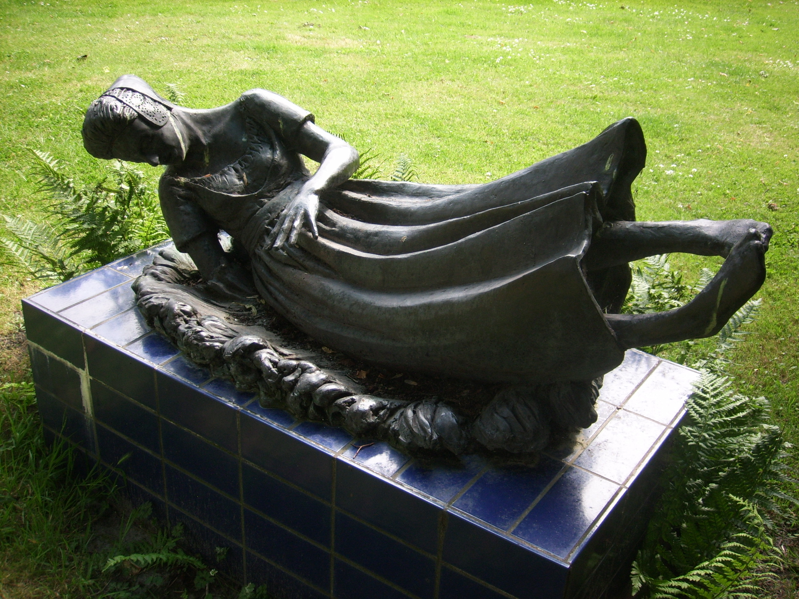 Standbeeld van Jan Haas van het melkmeisje in Oost-Souburg (Foto Ruben A. Koman, 2008)